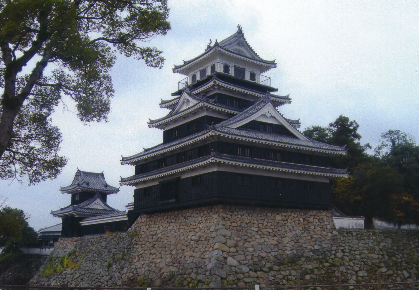 2009年秋中津城